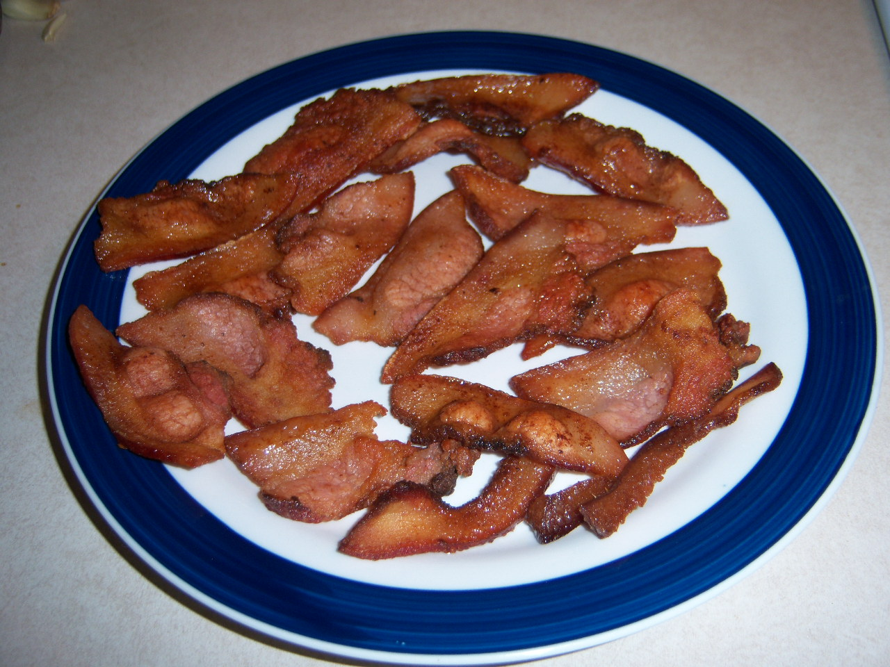 Fried pork jowl